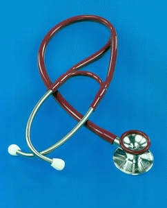 Stetoskop